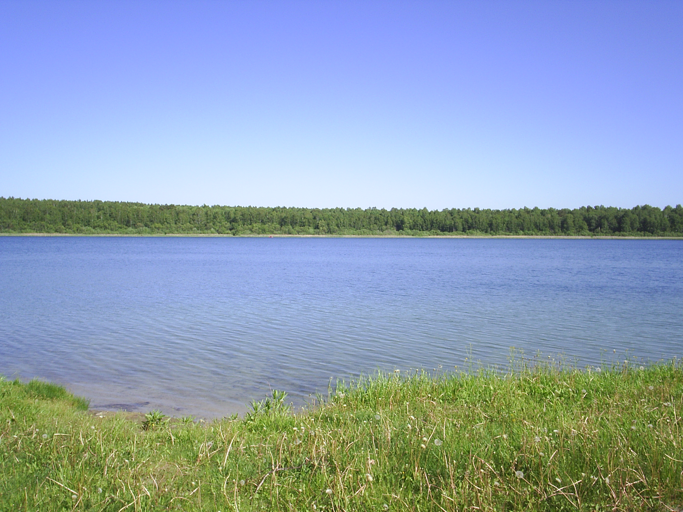 Вид озера Данилово